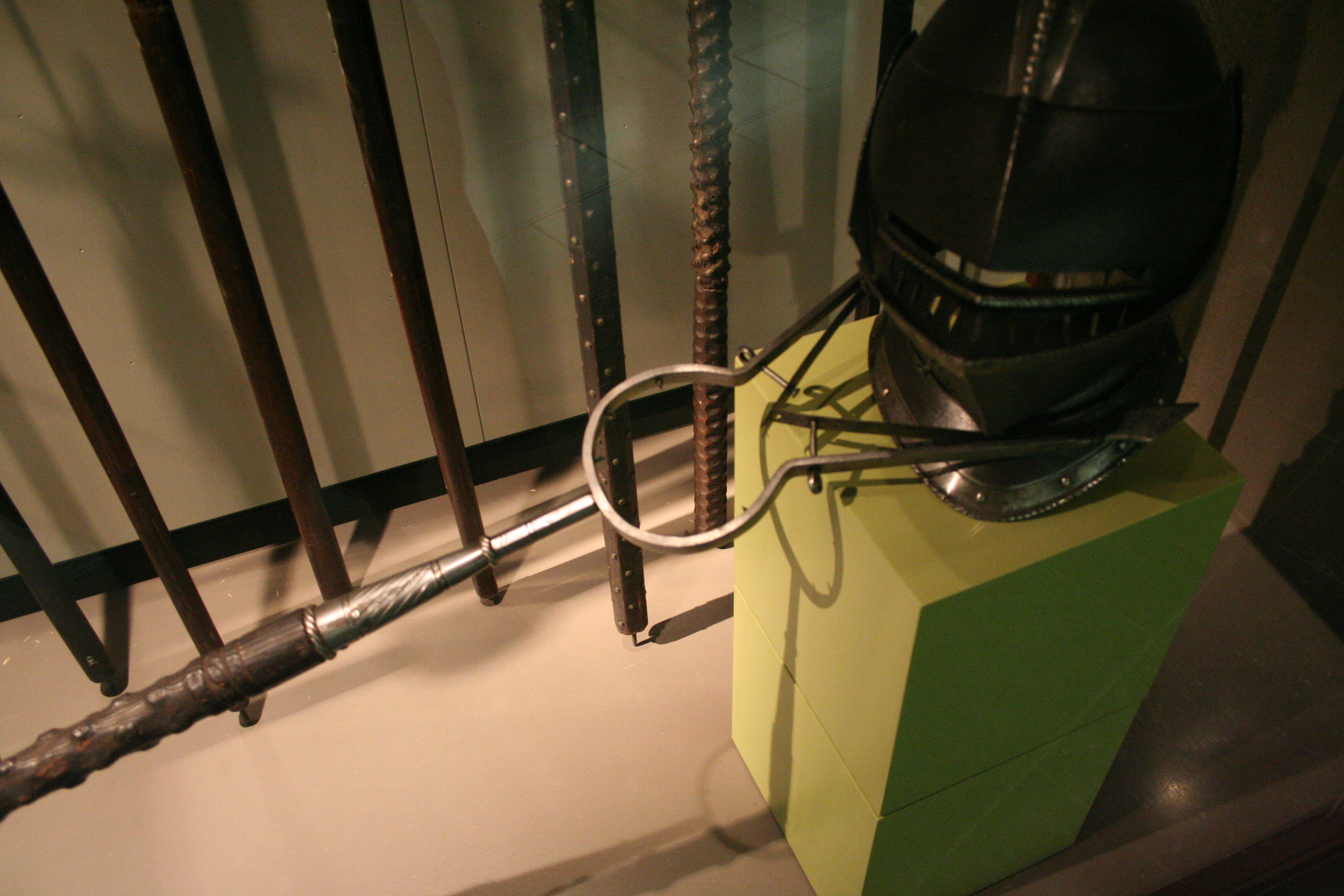 Attrape-coquin, arme servant à capturer une personne par le cou